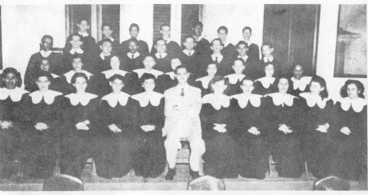 Coro de Bayamón con su director Dr. Angel M. Mattos, circa 1950.